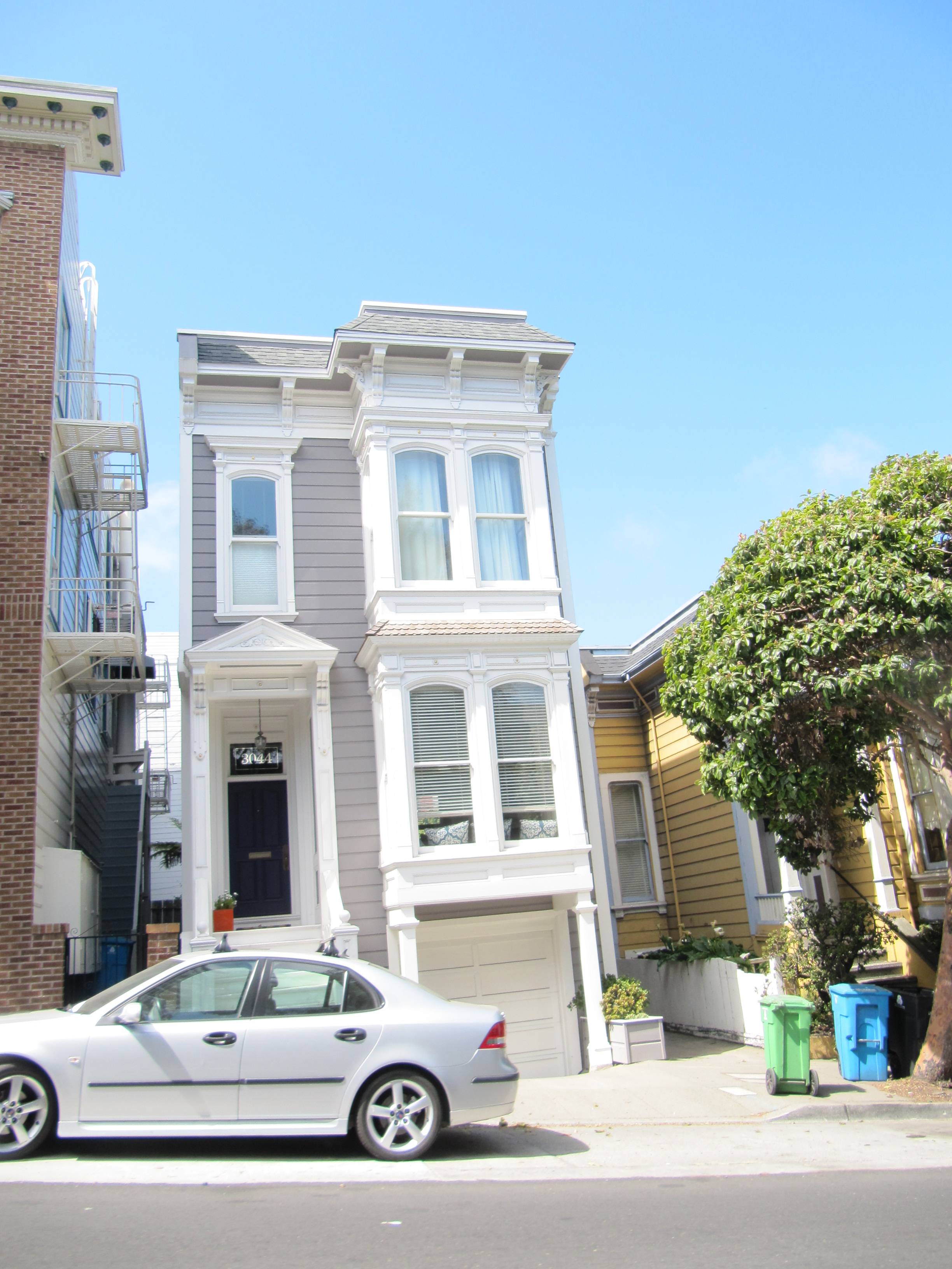 Fenêtre en baie a San Francisco en 2013